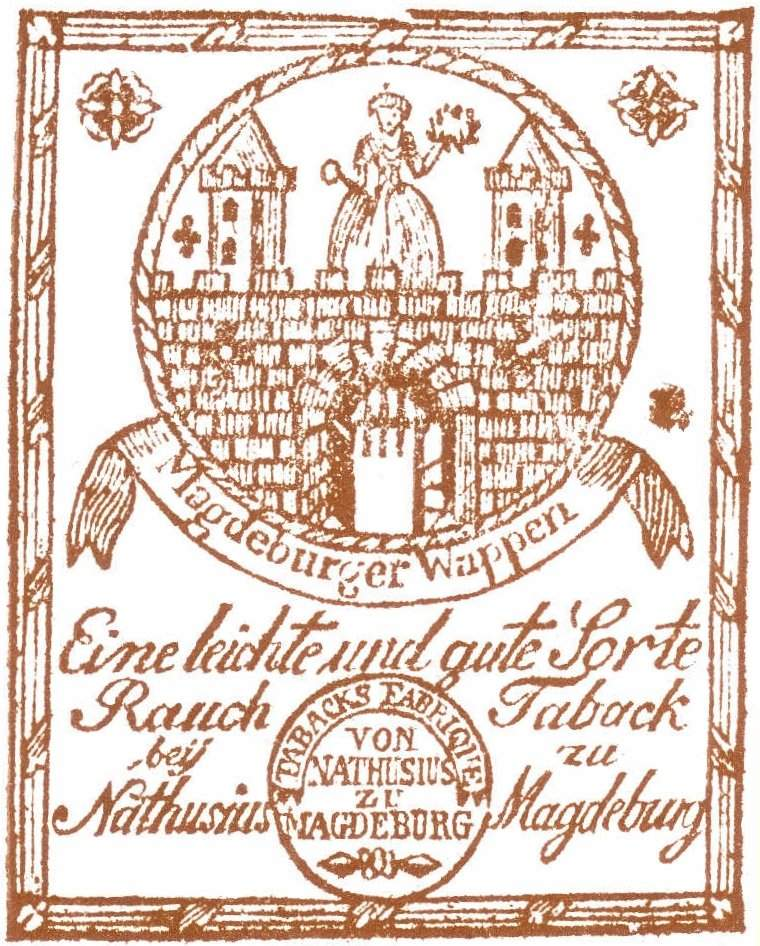 Tabak-Etikett der Magdeburger Tabakfabrik von Gottlob Nathusius